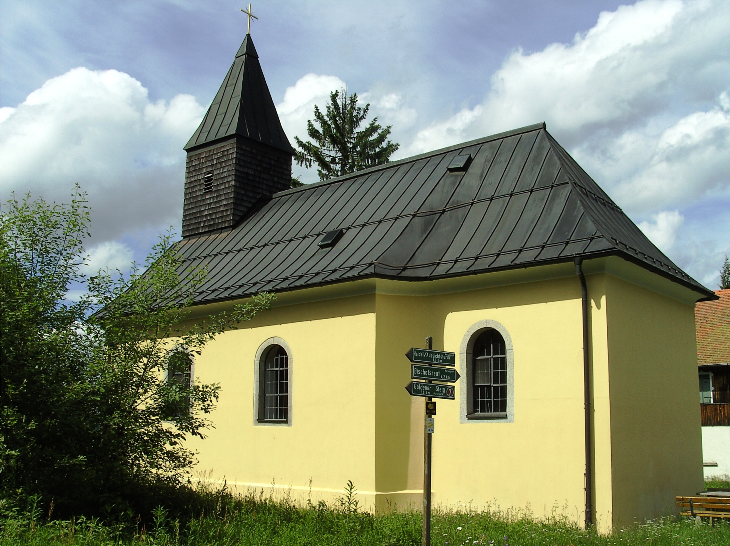 Die Sankt Johannes Nepomuk Kirche zu Leopoldsreut. Die Kirche befindet sich auf 1108 Meter über NN und ist somit die höchstgelegene im Bayerischen Wald.